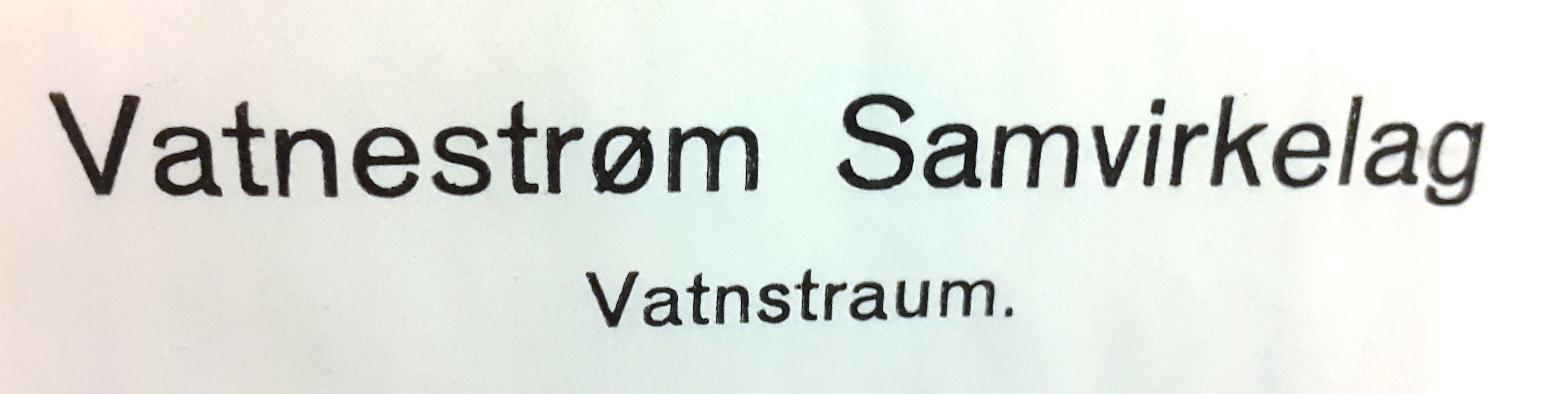 Logo til Vatnestrøm samvirkelag 1934